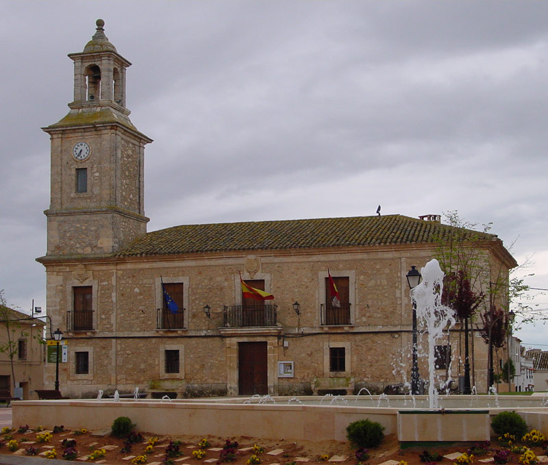 Ayuntamiento de Sisante - province of Cuenca.